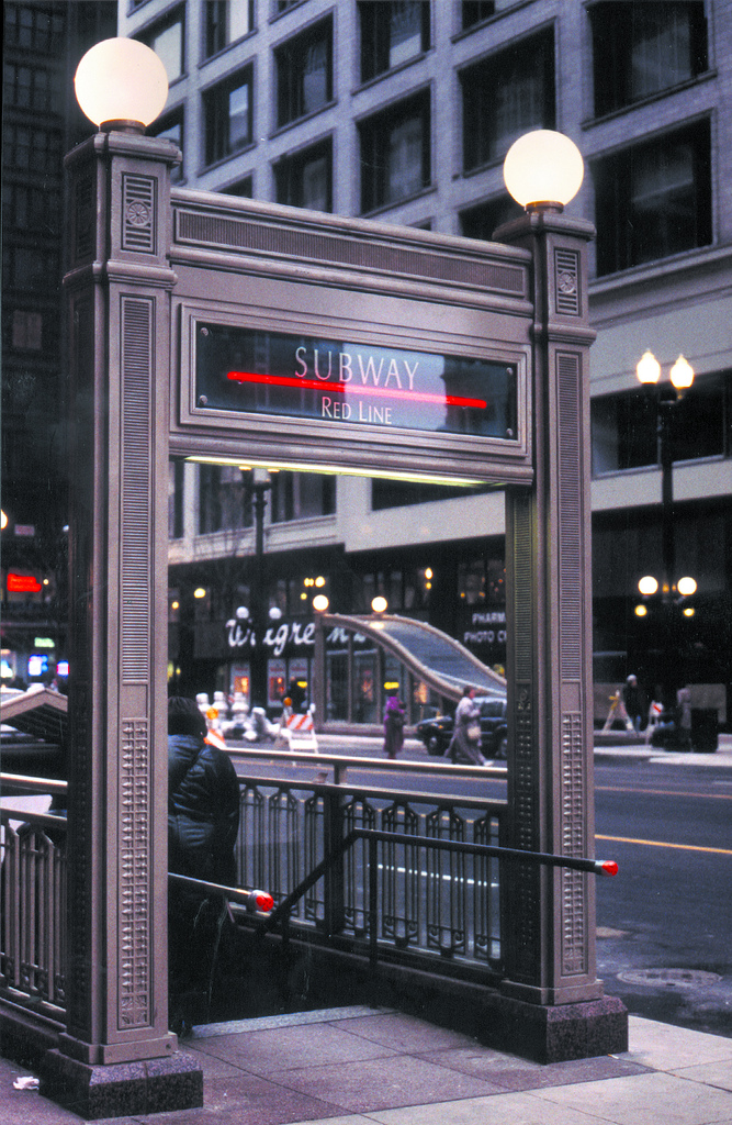 Image de la bouche de métro de Monroe sur la ligne rouge du métro de Chicago